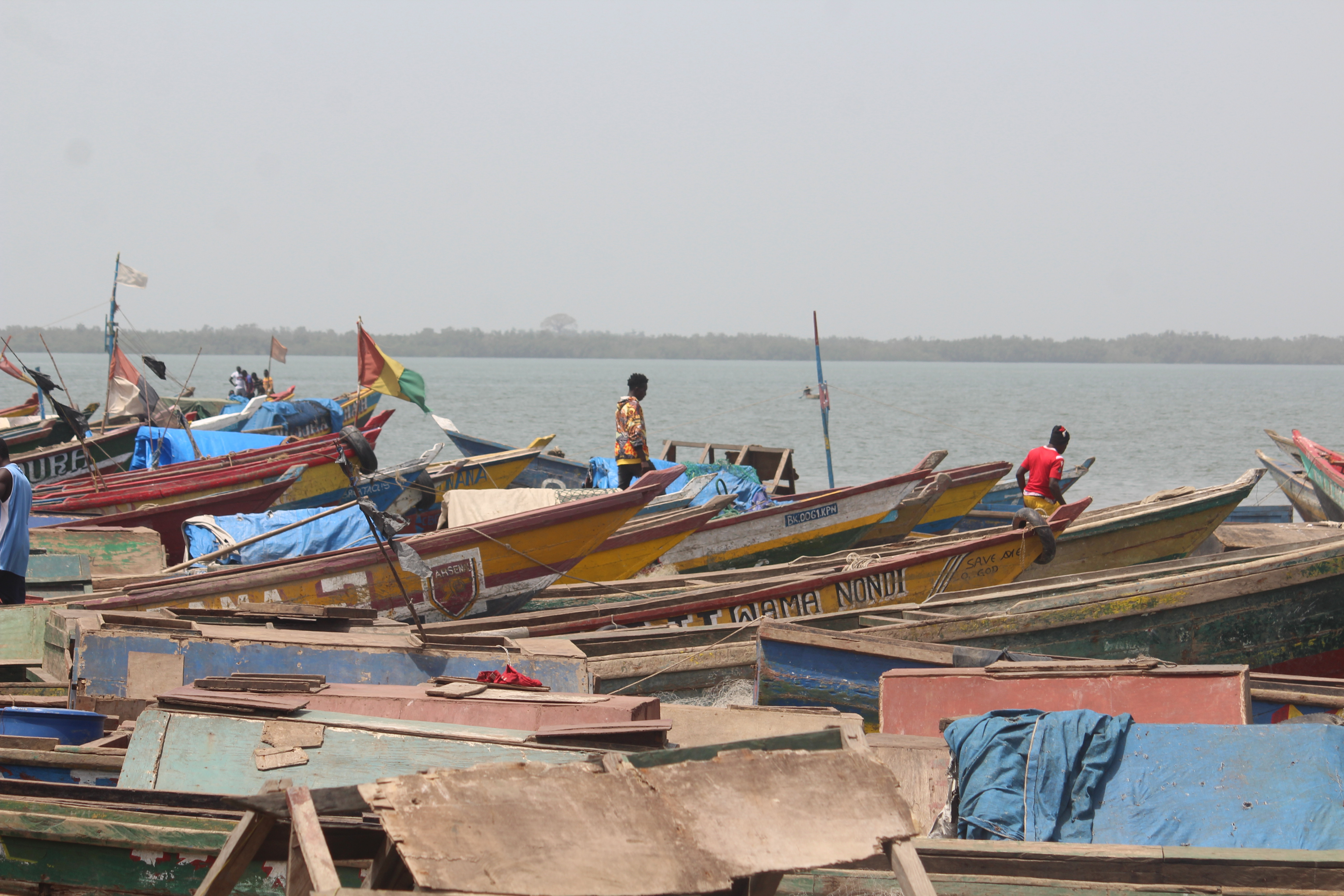 Debarcadere de port de Kamsar This is an image with the theme "Africa on the Move or Transport" from: Guinea